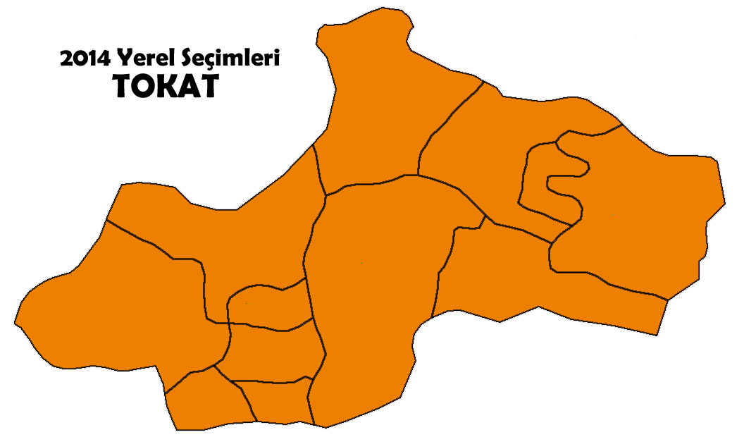 2014 Türkiye yerel seçimleri